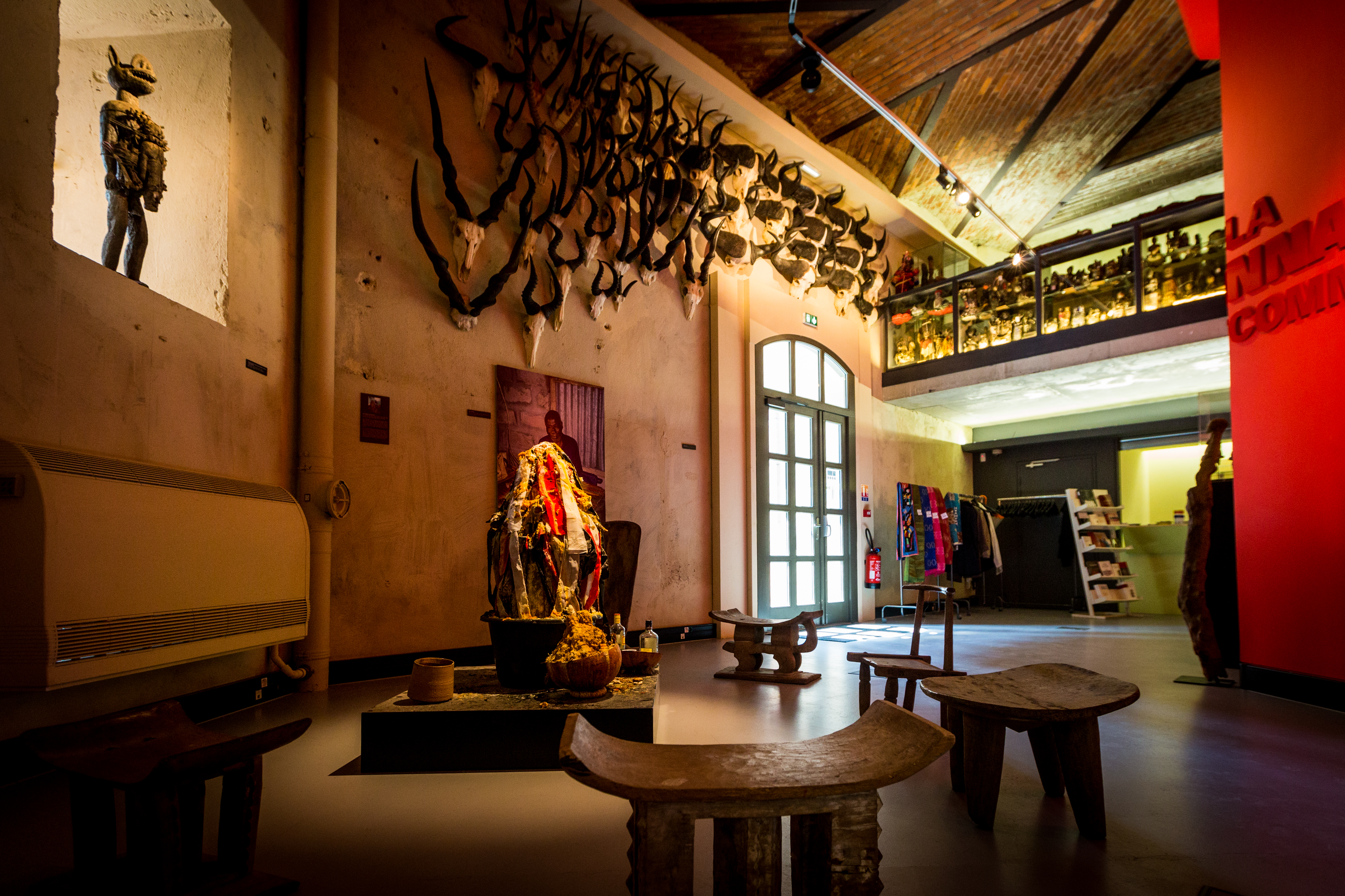 Musée Vodou collection Arbogast Strasbourg mai 2014